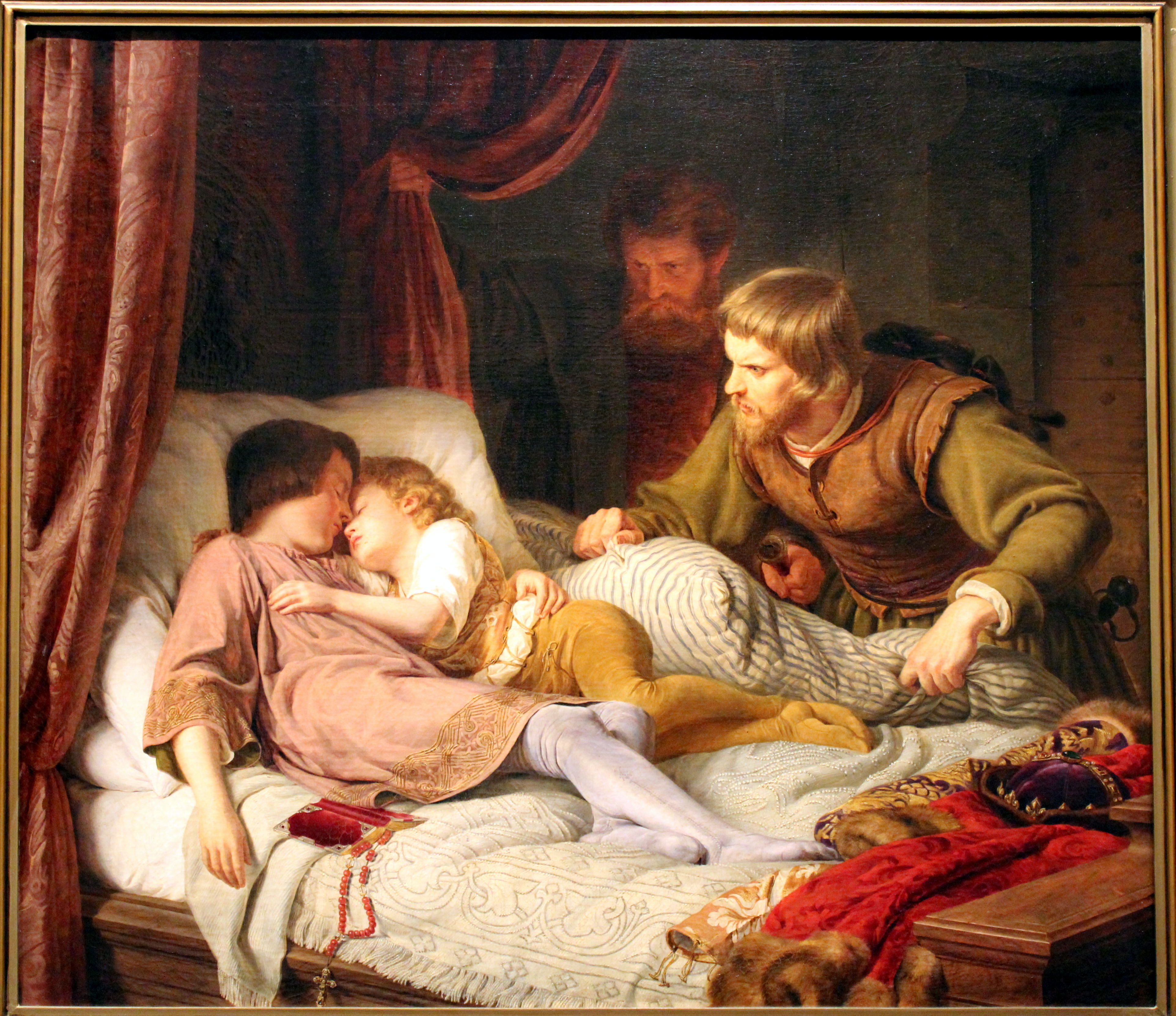 Die Ermörderung der Söhne Eduards IV.